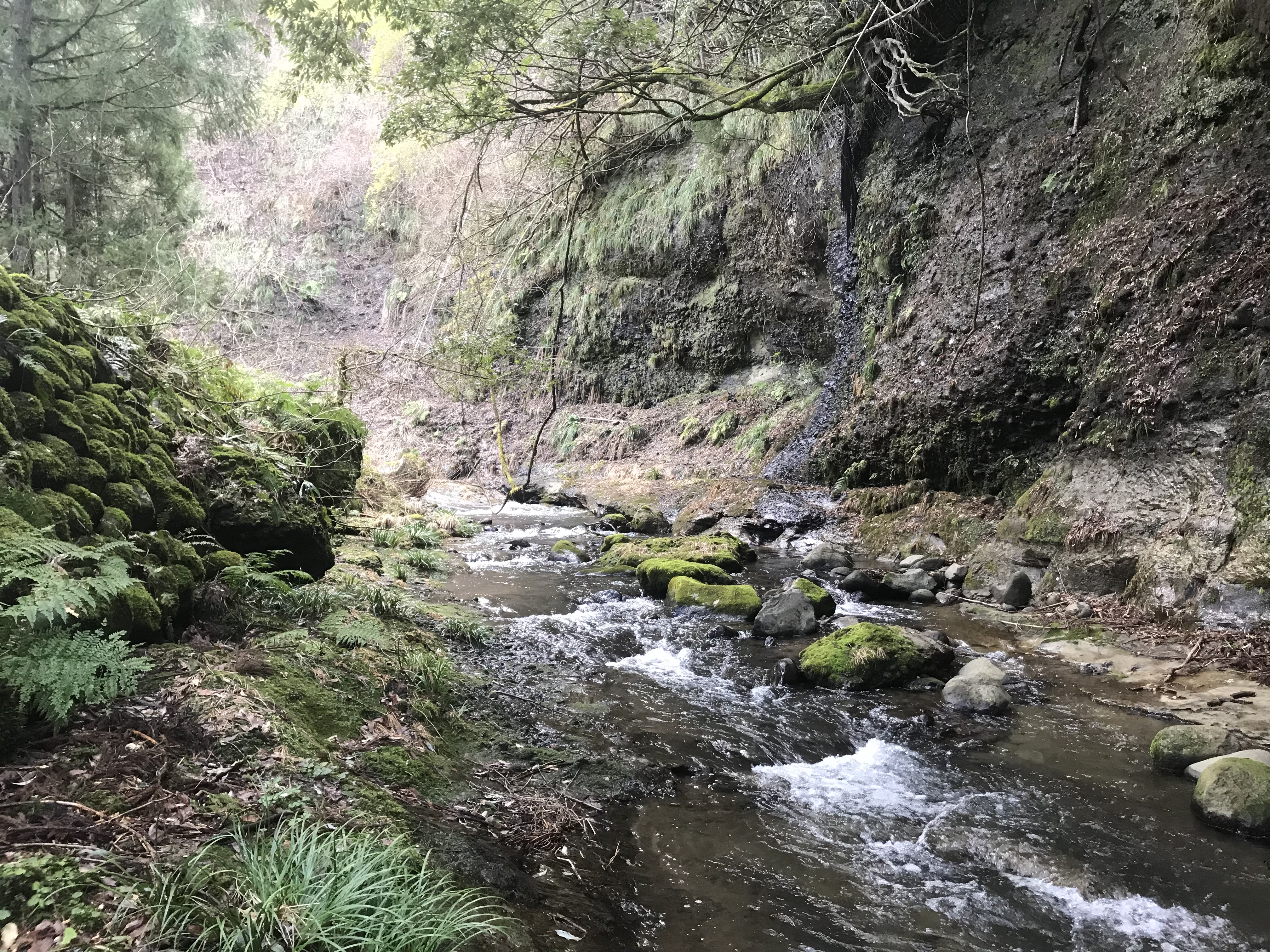 小佐波川です